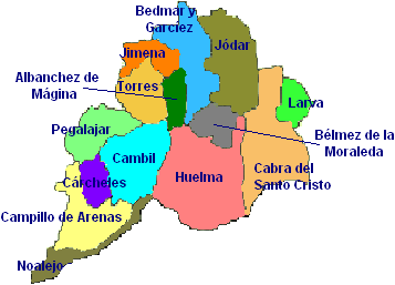 Mapa de municipios de la comarca de Sierra Mágina, en Jaén (España)